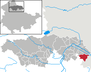 Wiehe in Thuringia - Kyffhäuserkreis